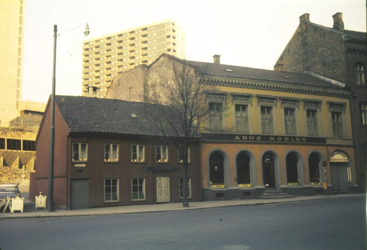 Grønlandsleiret 28 og 30. Boligblokker på Enerhaugen i bakgrunnen.